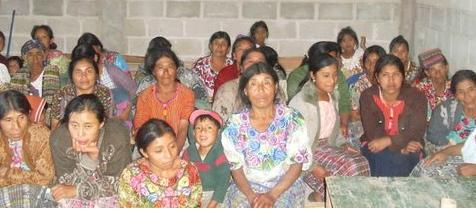 Asamblea de mujeres en el paraje Paxám en el Departamento de Totonicapan, Guatemala. La mayoría de los habitantes pertenece a la etnia Quiché.